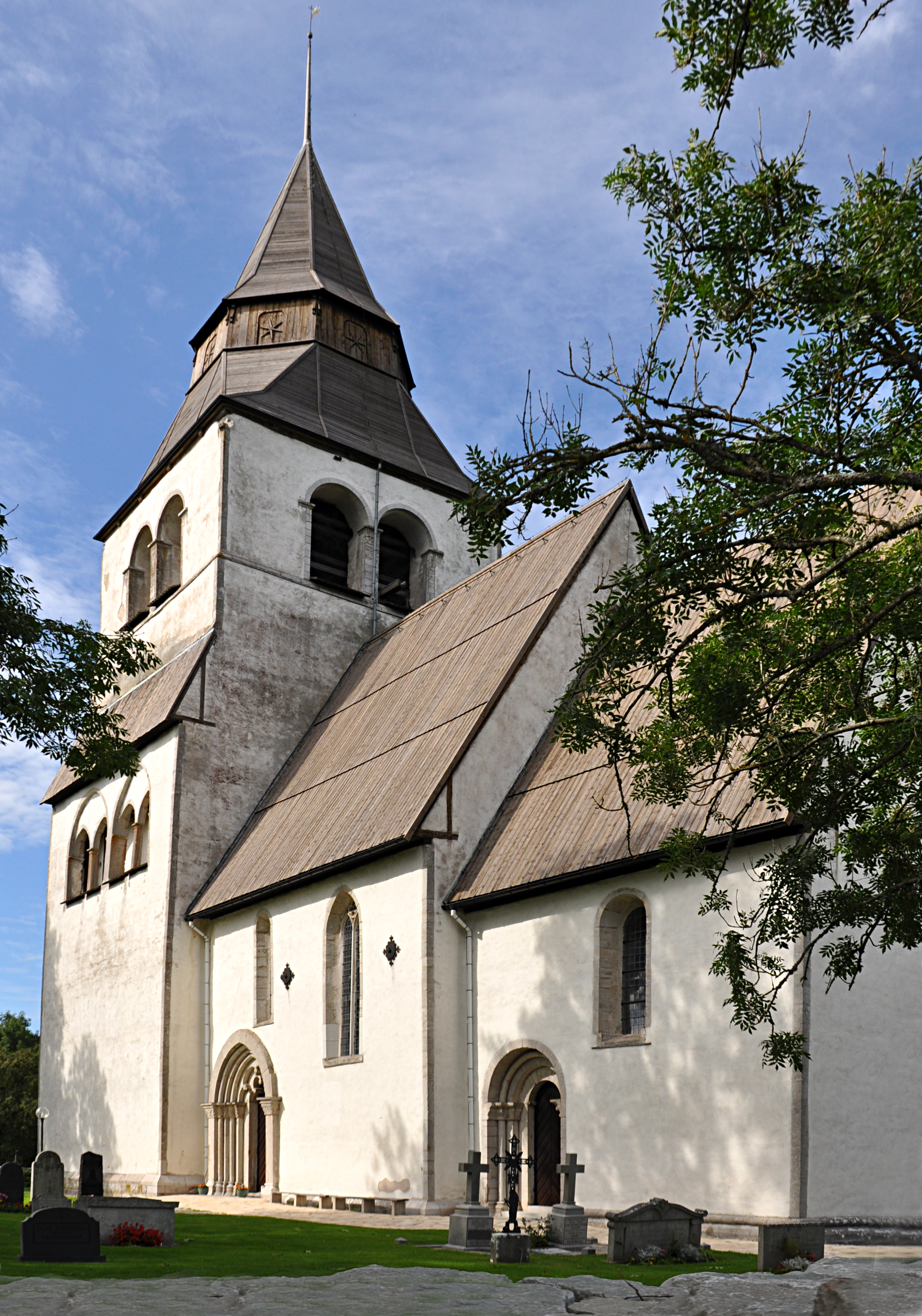 Lokrume kyrka på Gotland.